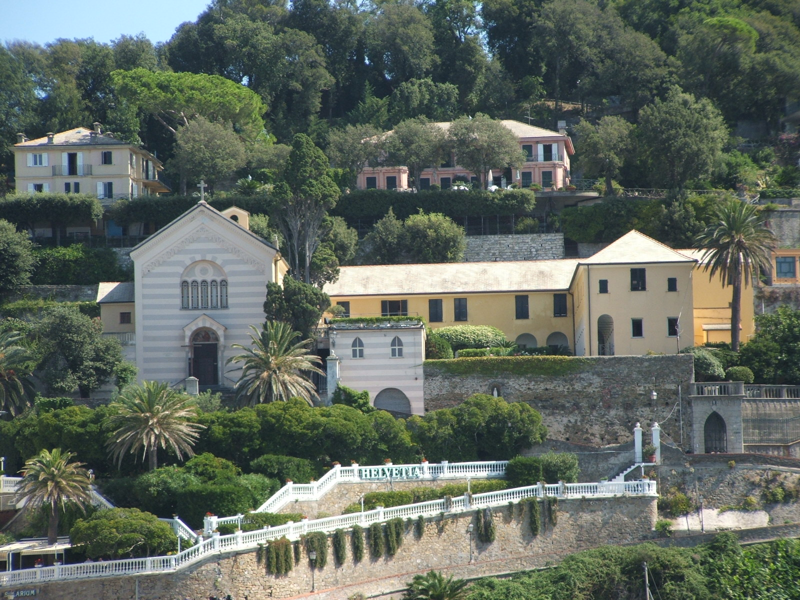 Immagine da Sestri Levante